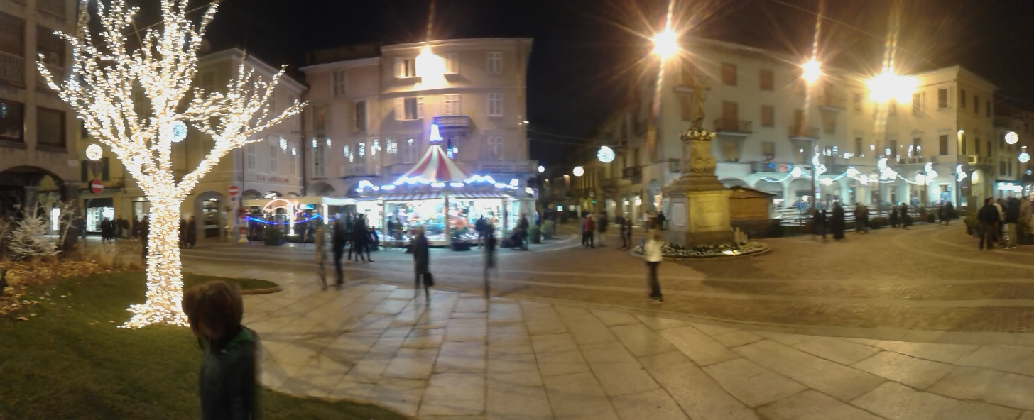 In centro a Borgomanero prima di natale